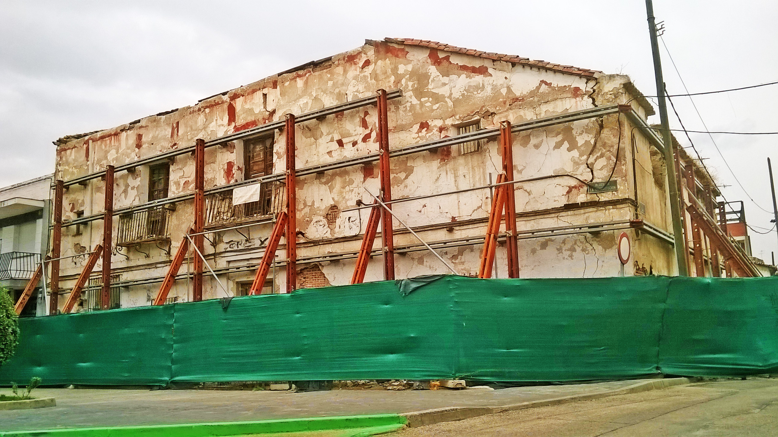 Casa del siglo XVII perteneciente a Bartolomé Hurtado siendo esta su casa de recreo en Parla, en proyecto de restauración con los andamios en la fachada, es la casa mas antigua e histórica de la ciudad